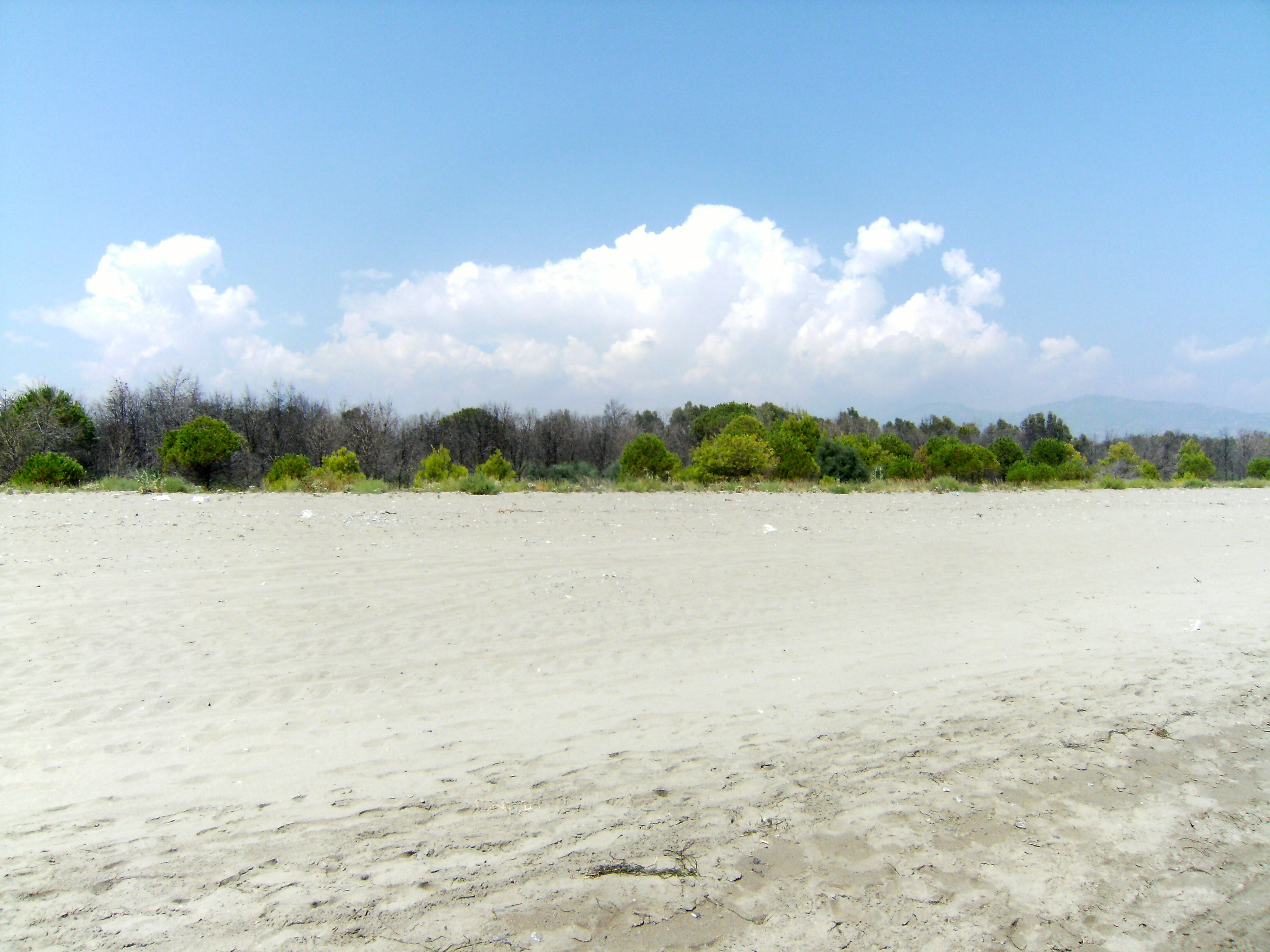 Spiaggia libera / Villapiana - frazione Scalo (CS)